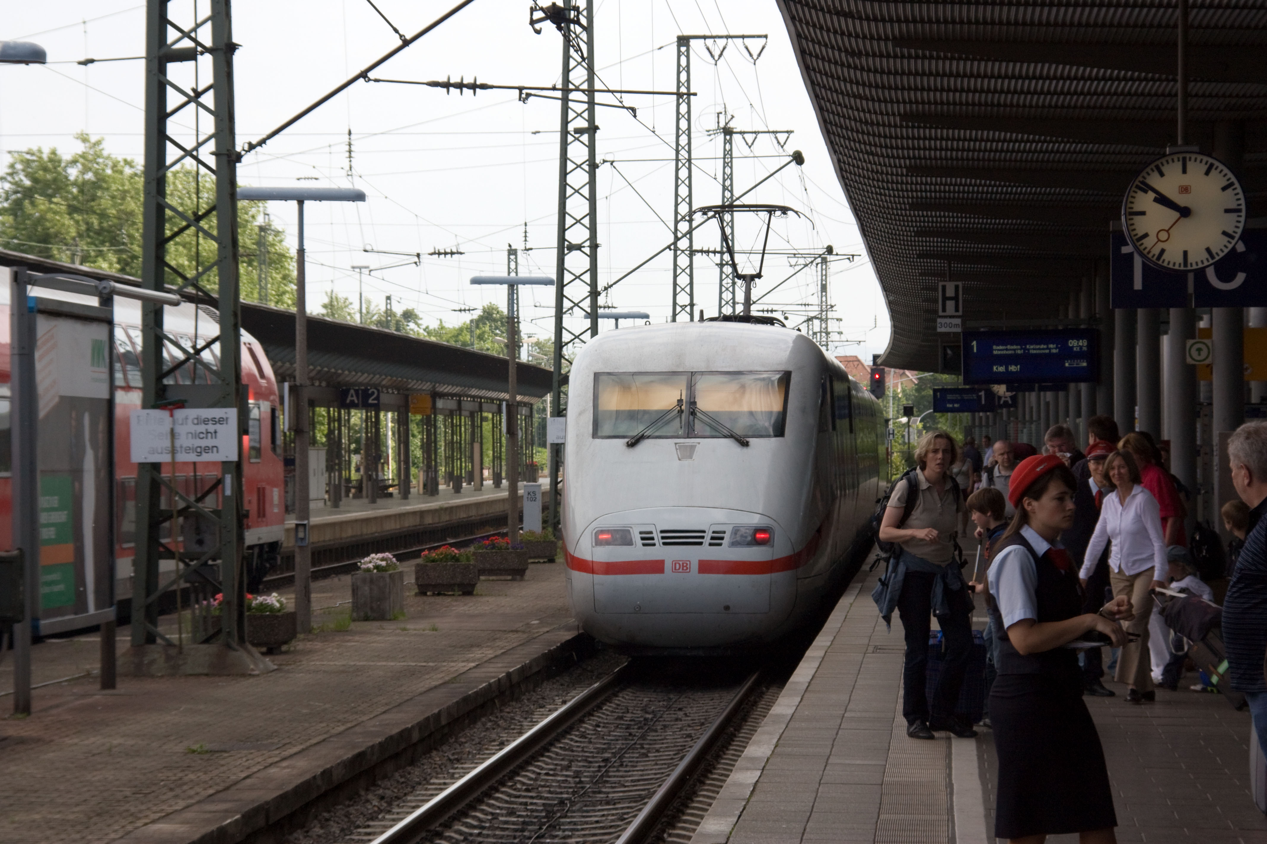 Gare de Fribourg (Freiburg Hauptbahnhof), Freiburg im Breisgau, Allemagne (Germany)